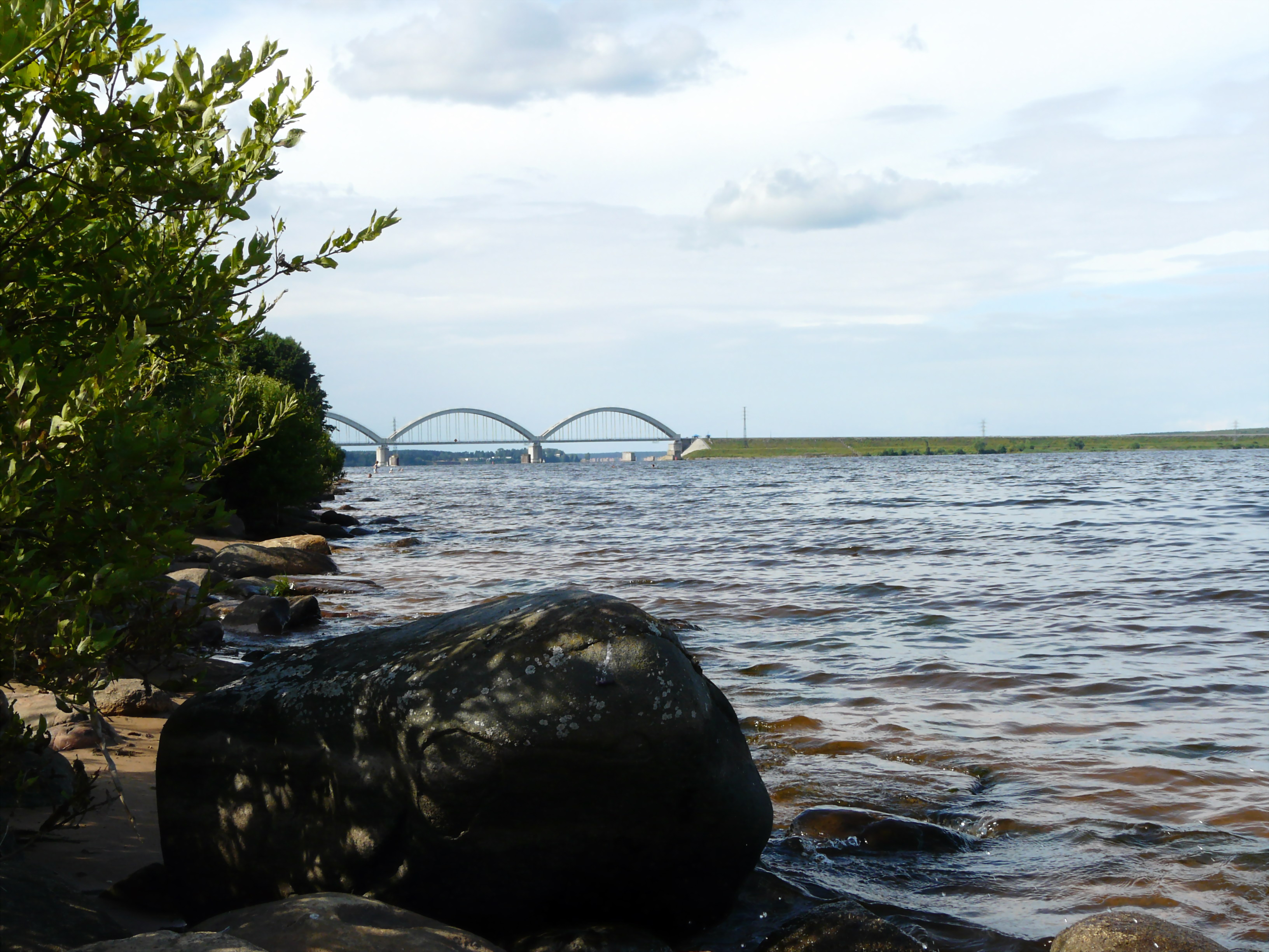 Ажурный мост через Волгу, состоит из 4 пролетов, находится на территории Некоузского муниципального района Ярославской области